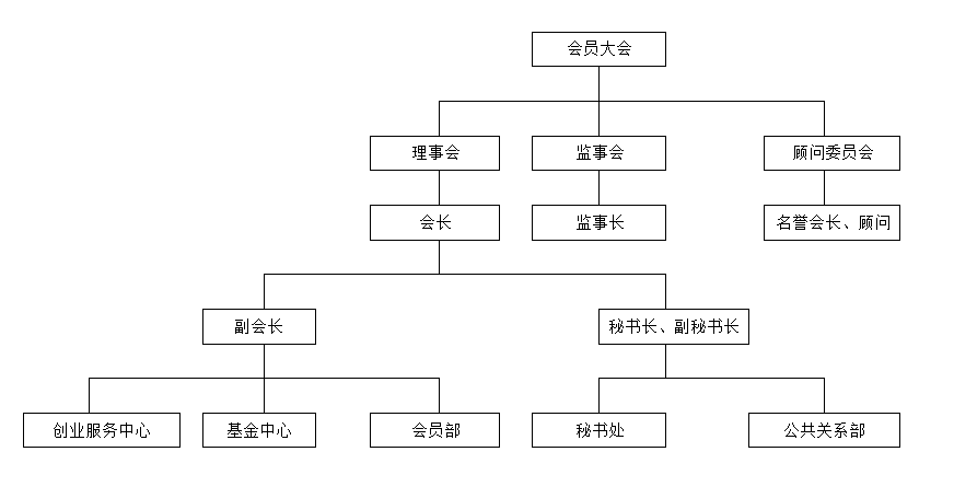 加拿大中华总商会组织架构